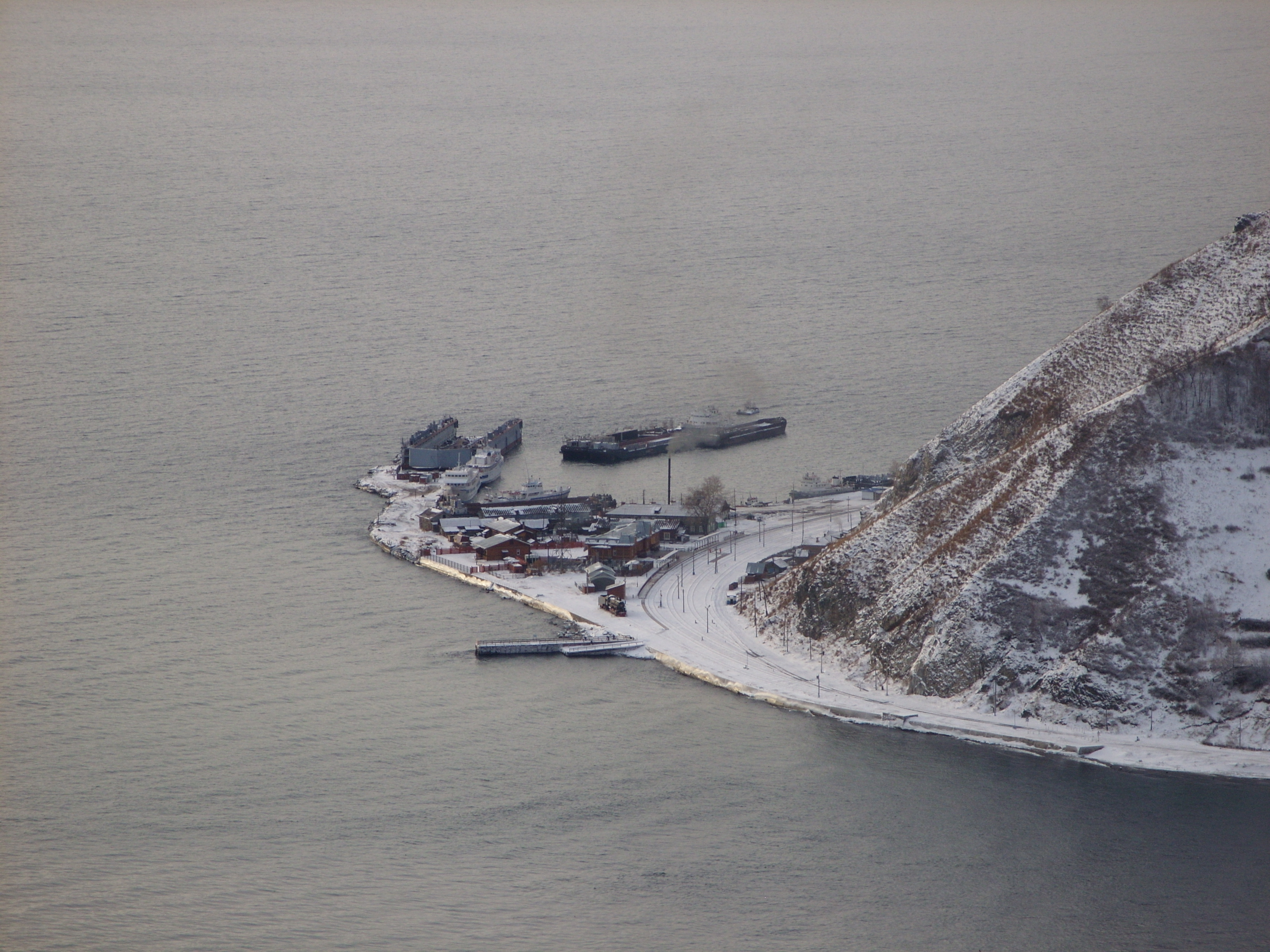 Снято с горы Камень Черского с 5-кратным оптическим зумом.